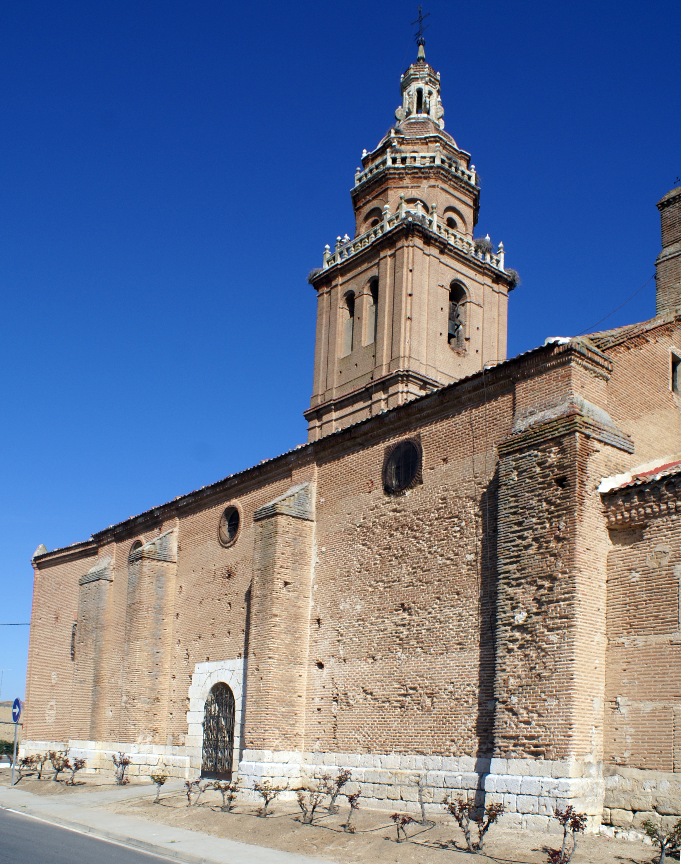 Fachada sur de la iglesia de Santa María Magdalena de Matapozuelos, Valladolid, España.